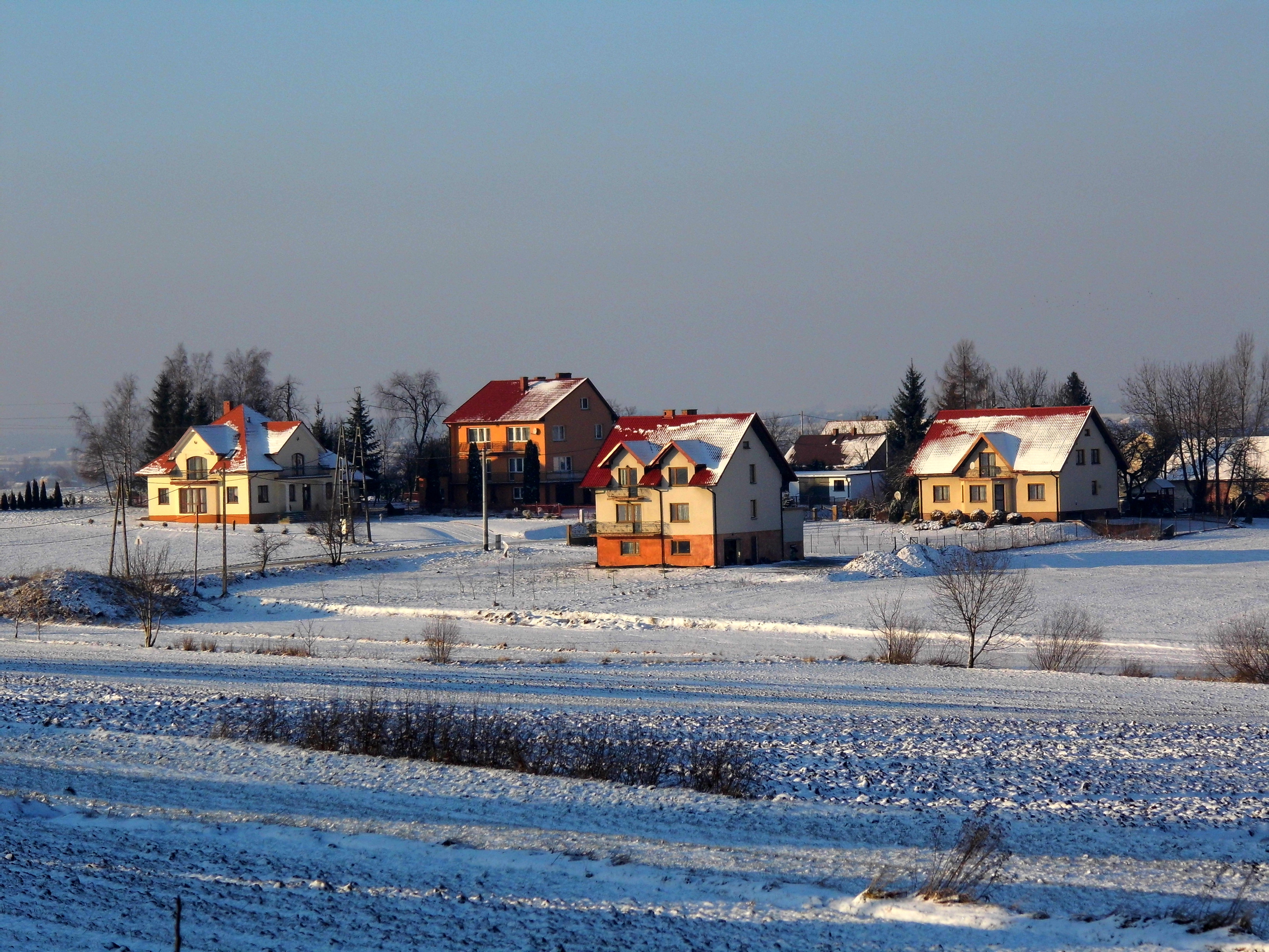 Lgota Wielka